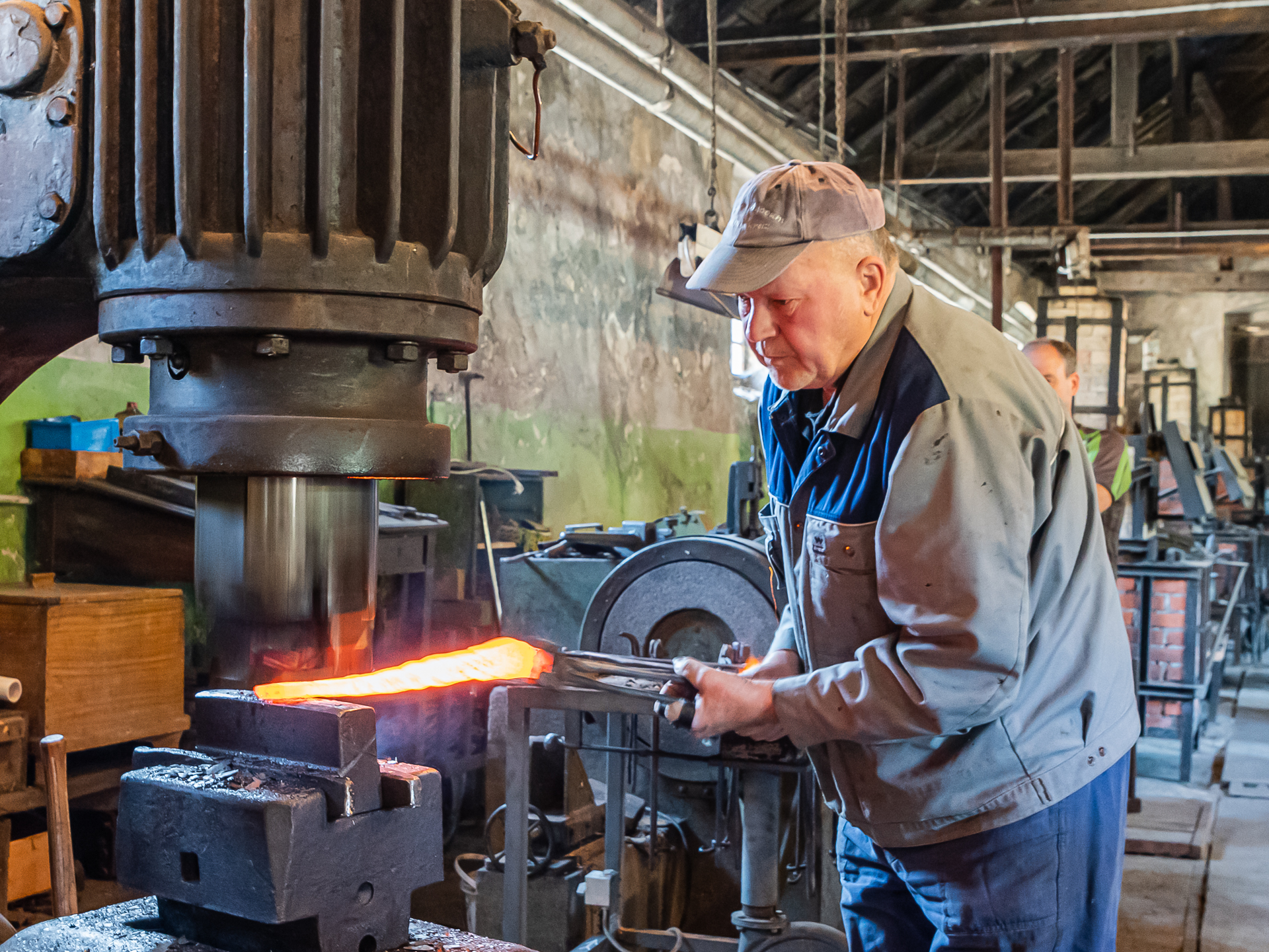 Der Schmied Hubert Wagner am Schmiedefeuer beim "Zainen", der Herstellung der Grobform einer Sense, am Bêché Lufthammer im Museum Geyerhammer in Scharnstein. Dieses Bild wurde anlässlich des österreichischen Tags des Denkmals 2019 in Oberösterreich eingereicht. Diese Datei wurde im Rahmen von WikiDaheim 2019 in Österreich erstellt und hochgeladen.Sie wurde dem Themenbereich Denkmalschutz zugeordnet.